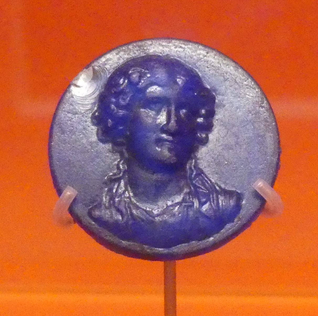 Médaillon d'une phalère (récompense militaire pour les soldats et les auxiliaires) avec le portrait d'Agrippine en pâte de verre bleue cobalt.